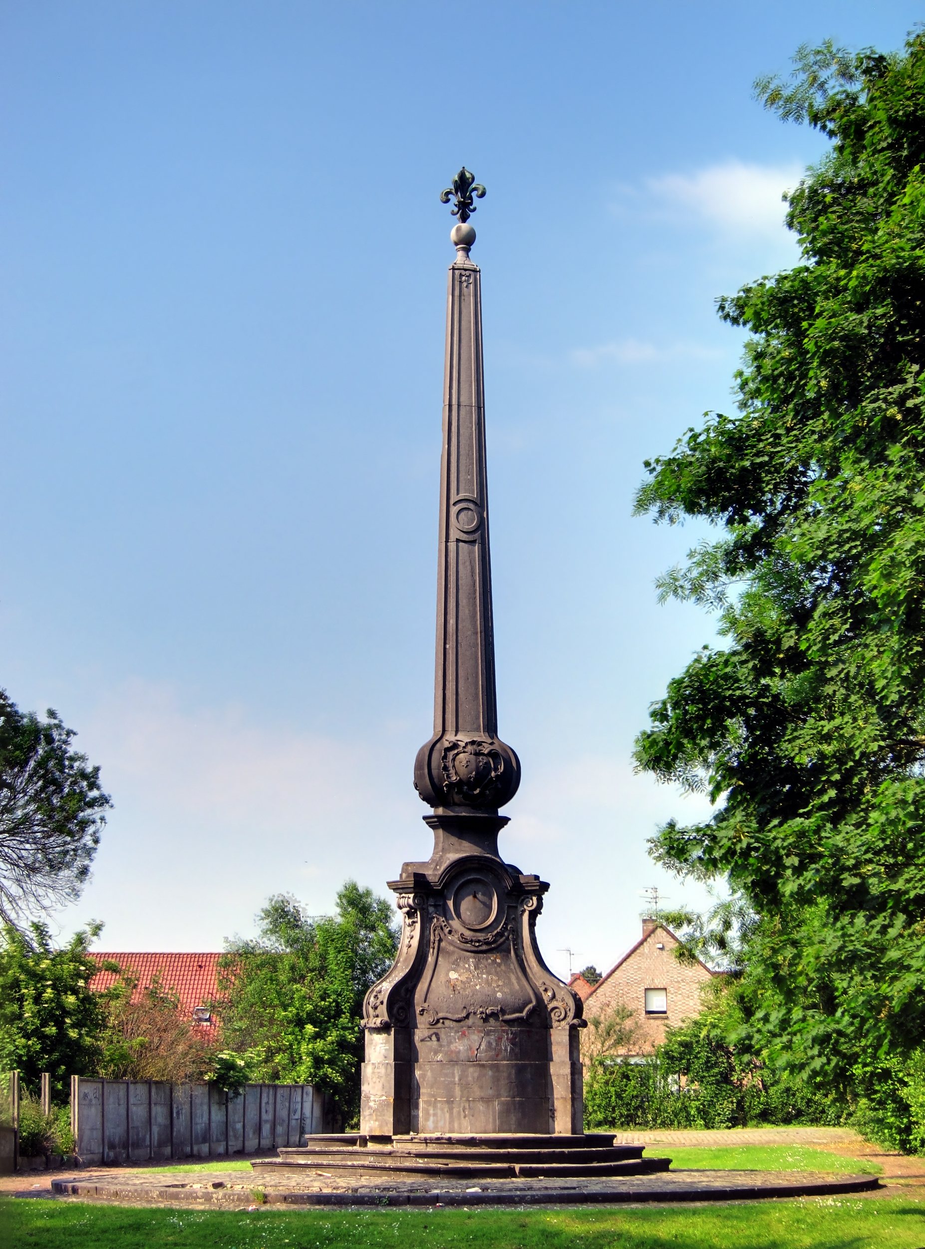 La Pyramide de Fontenoy à Cysoing (France - dép. du Nord).